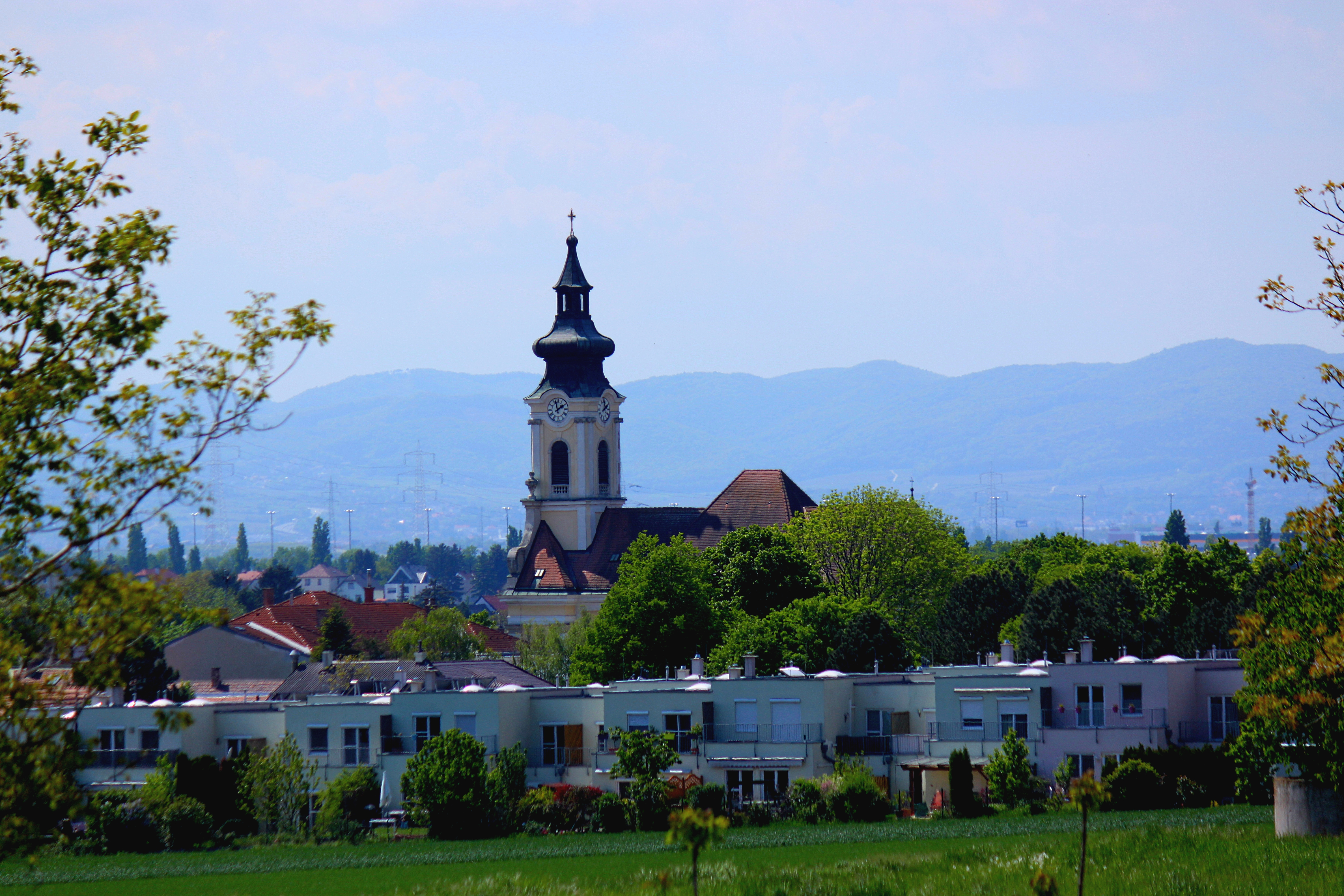 Oberlaa am 07.05.2016